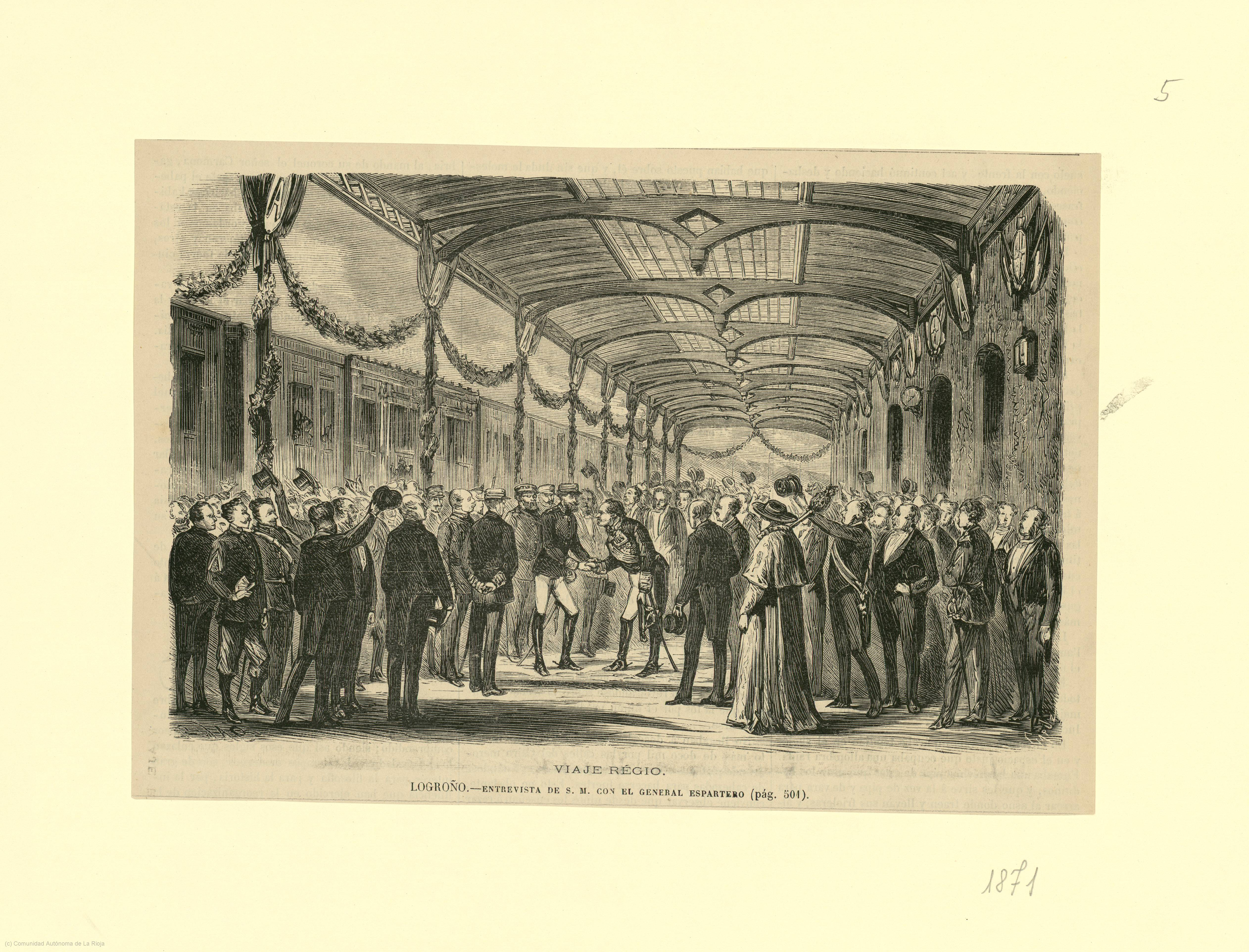 Viaje regio de Alfonso XII a Logroño, entrevista con el General Espartero, 1871, obra del pintor español Ramón Padró y Pedret.